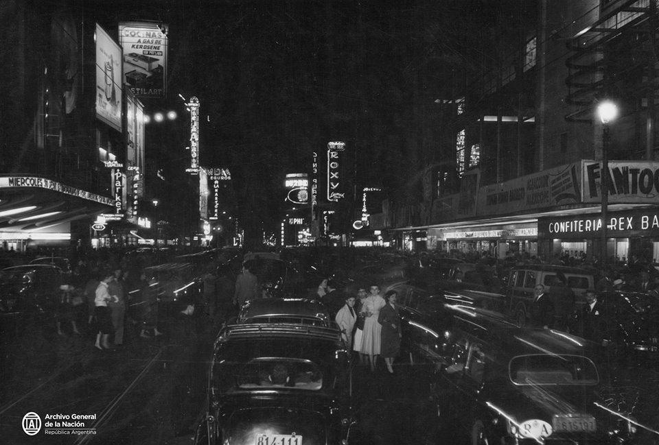 Vista nocturna de la Av. Corrientes, Buenos Aires 1957.